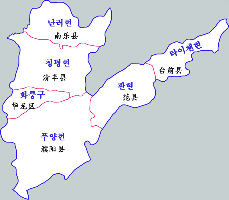 푸양시 현급행정구역도